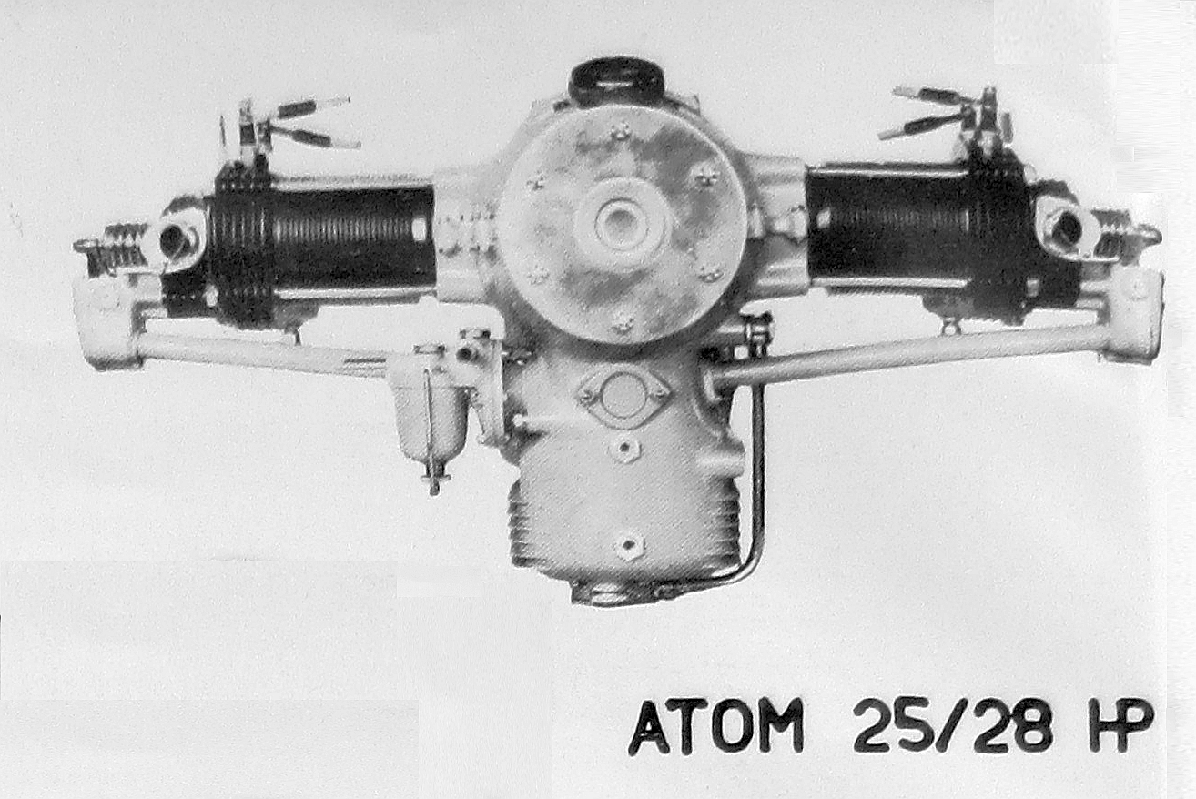 letecký motor Walter Atom (1934)